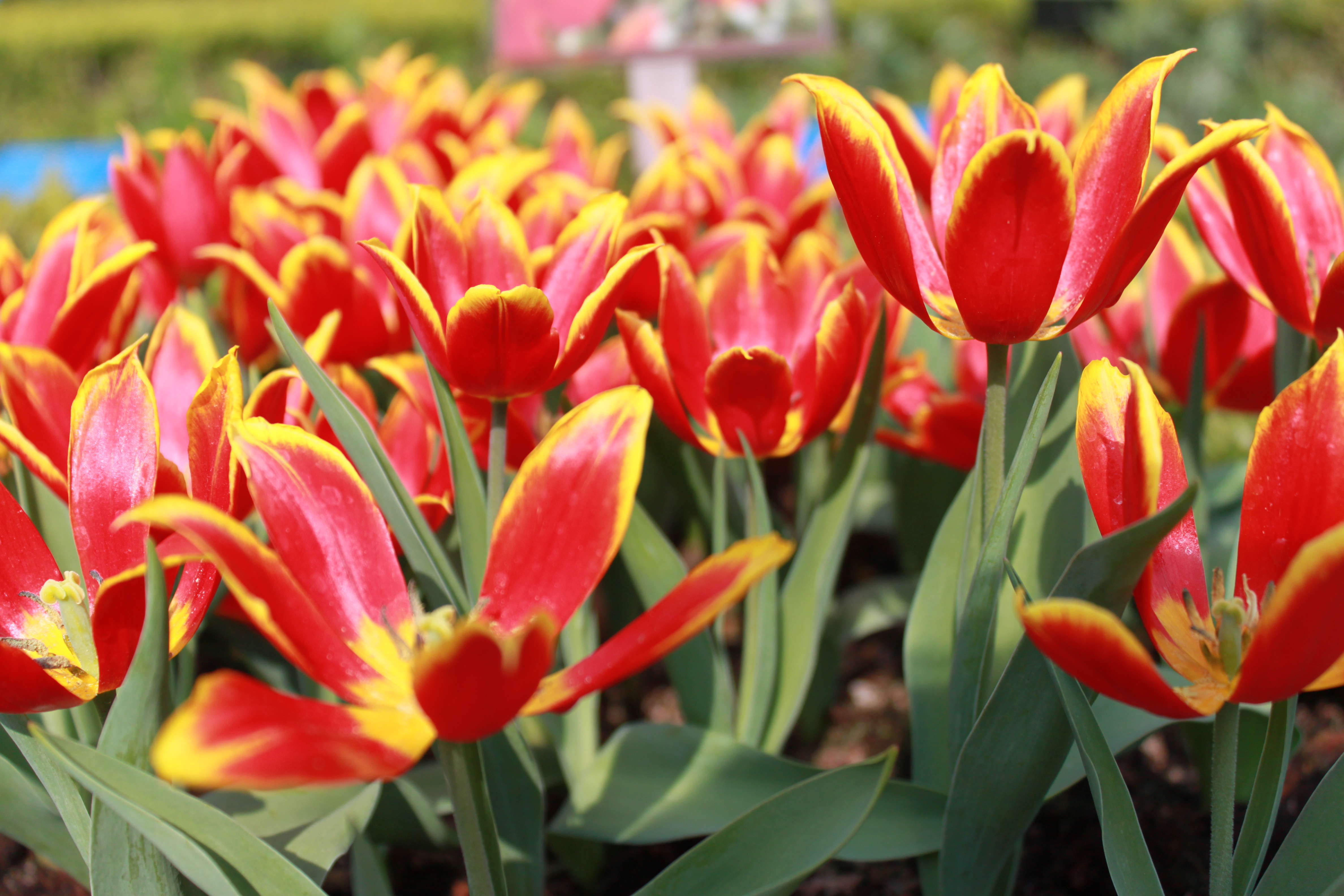 Tulipa suaveolens, Hortus Botanicus, Amsterdam